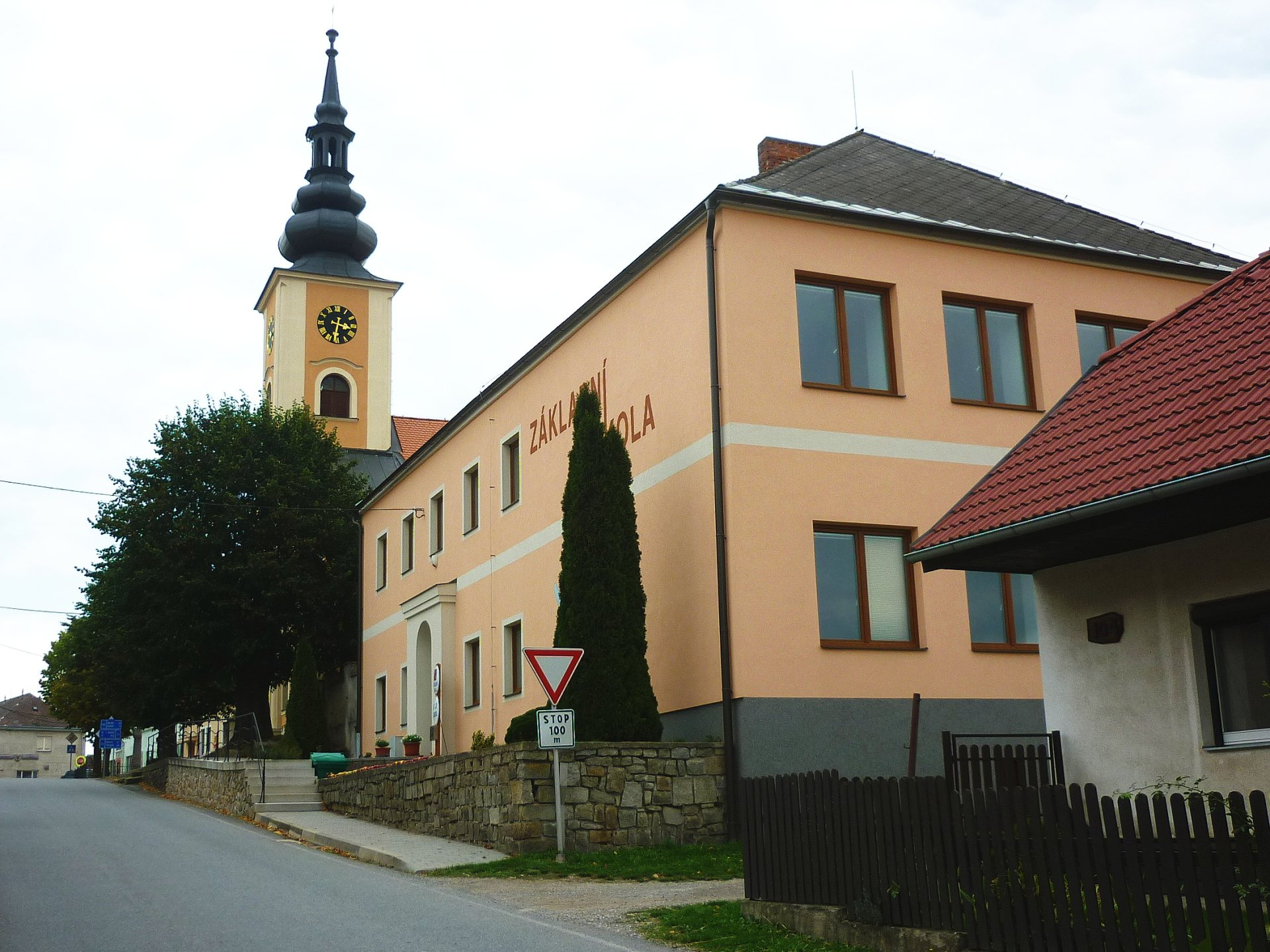 Základní škola ve Staré Říši